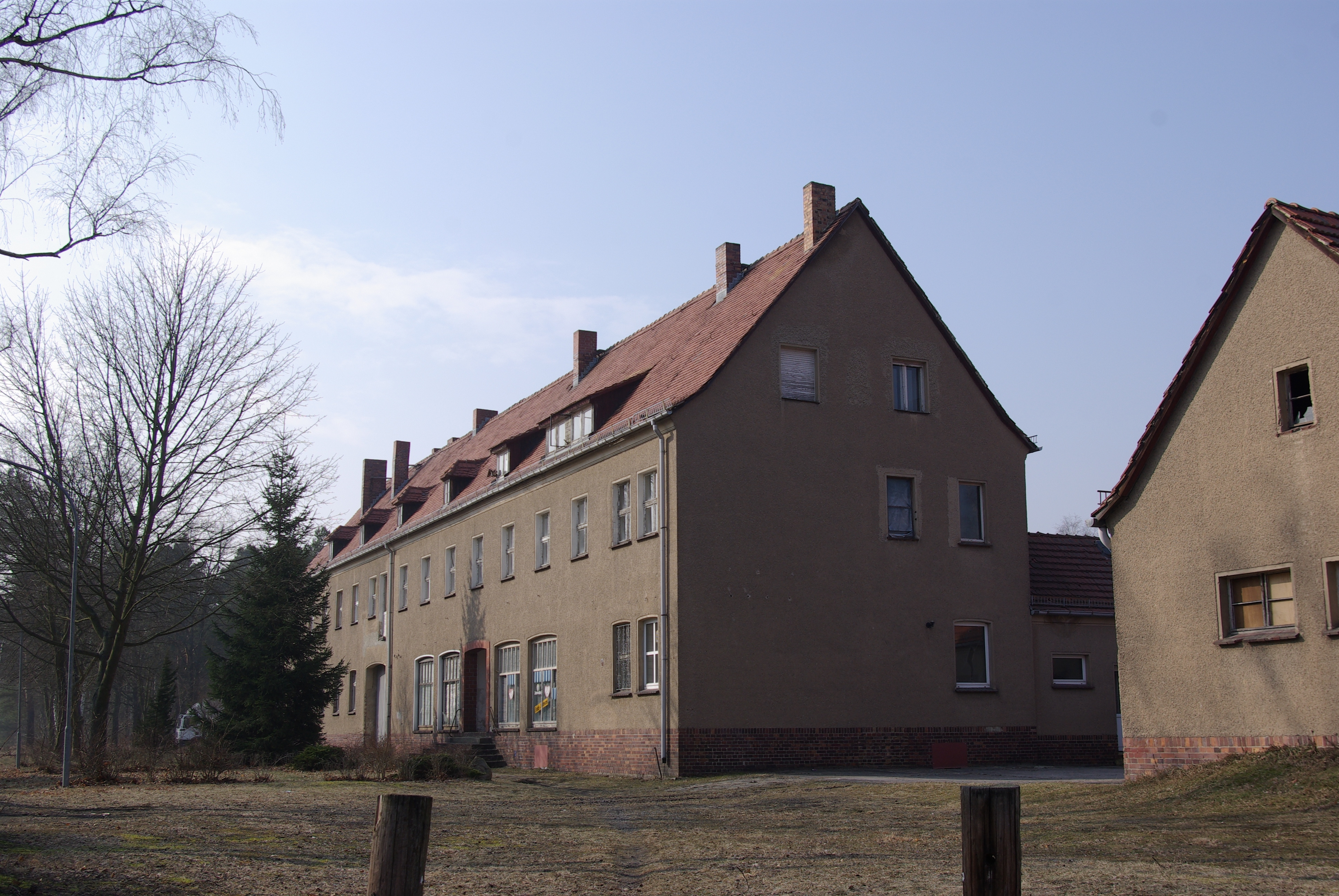 Am Mellensee in Brandenburg. Die Häuser an der Straße nach Luckenwalde 2 - 5 stehen unter Denkmalschutz.